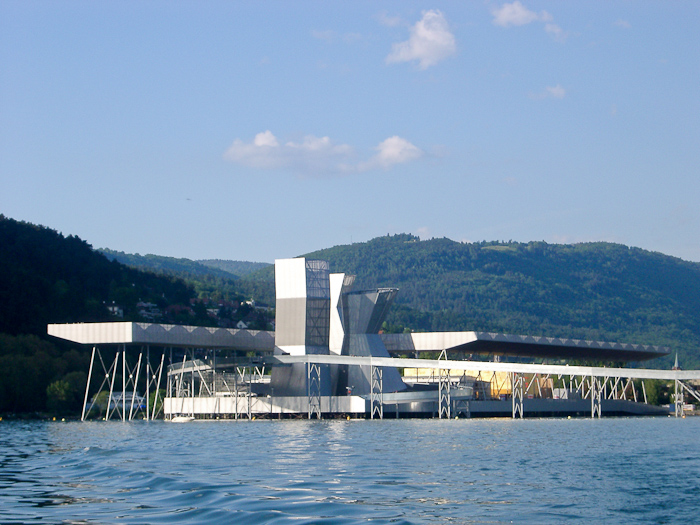 Die EXPO.02 Platform am Standort Biel vom See aus gesehen.